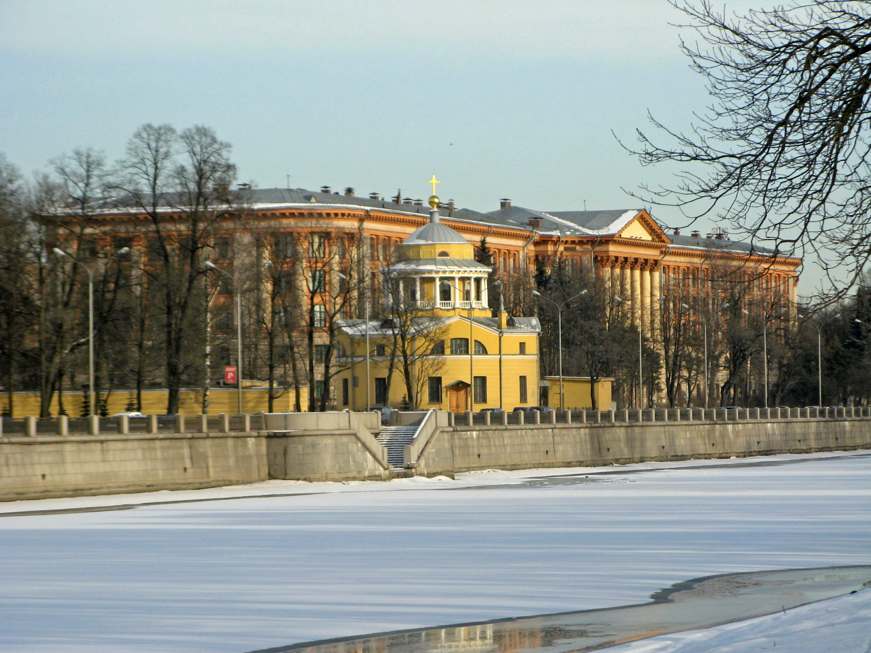 Церковь Благовещения Пресвятой Богородицы: Приморский проспект, 79, Приморский район, Санкт-Петербург